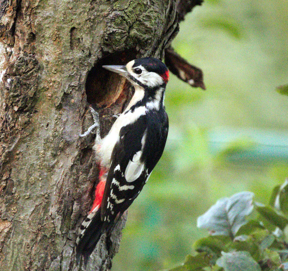 Male great spotted woodpecker (Dendrocopos major) inspecting a (woodpecker-made) nesting hole in a tree. Samiec dzięcioła dużego (Dendrocopos major) zaglądający do (wykutej przez dzięcioła) dziupli w drzewie.